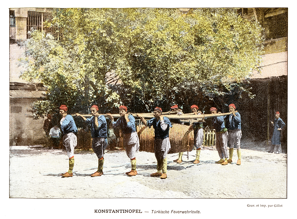 Pompiers fin XIXème siècle à Constantinople